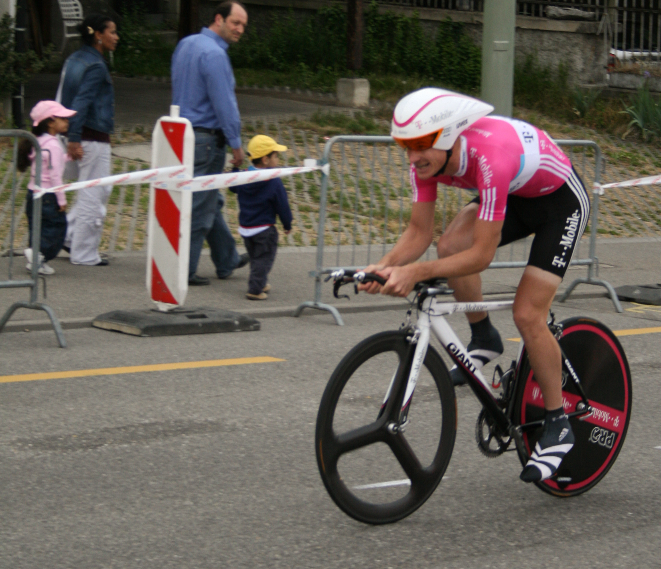 Michael Rogers prologue du Tour de Romandie 2007